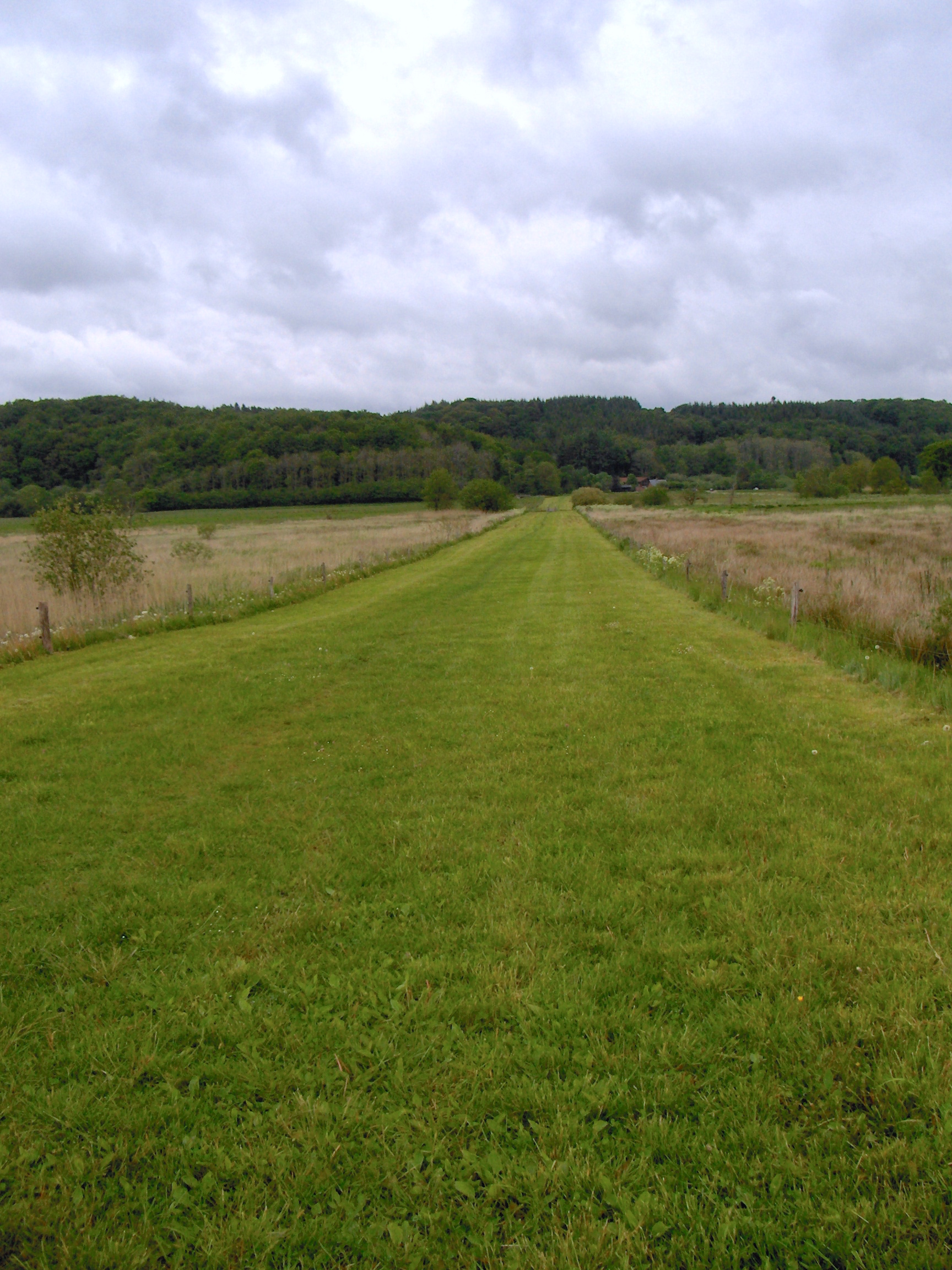 Ravningbroen